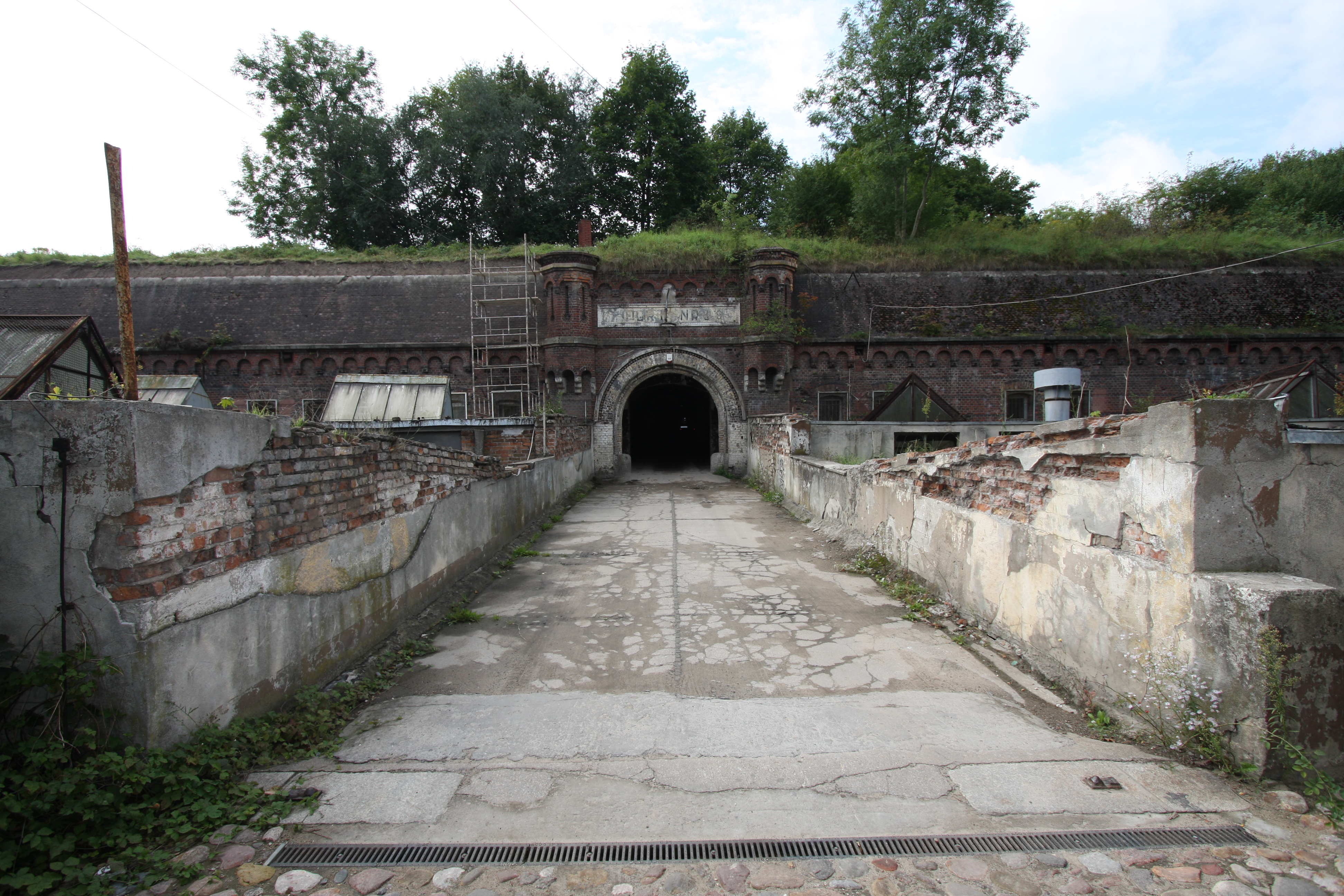 Poznań, fort IX, w zespole fortyfikacji Twierdzy Poznań, mur., 1876-1896, ul. Głazowa